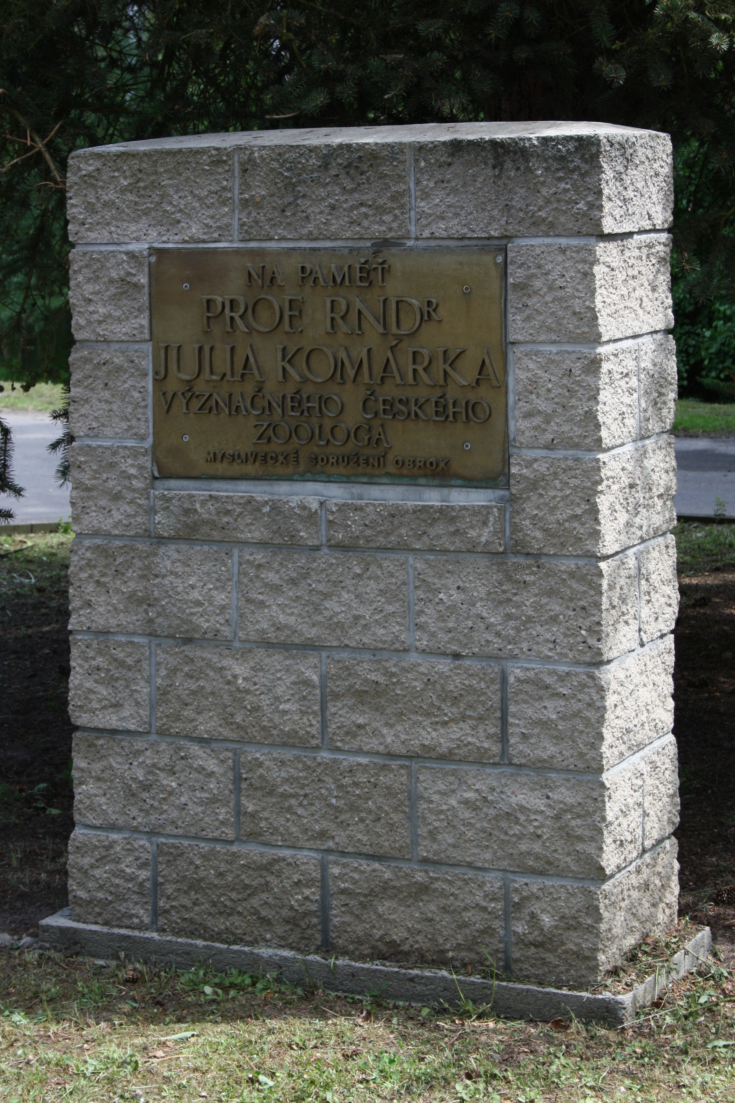 Obrok